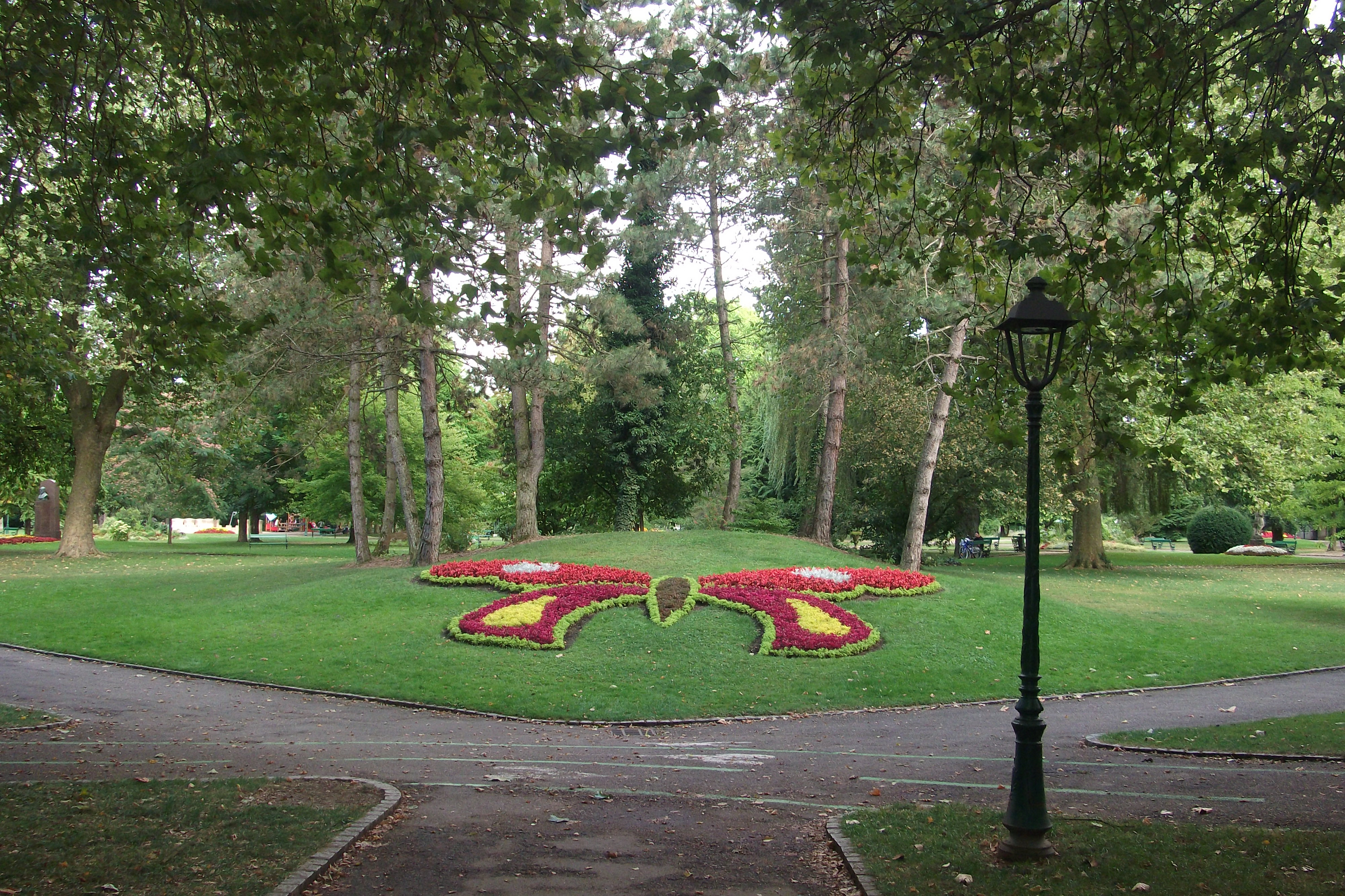 Le Jardin anglais de Vesoul (Haute-Saône, Franche-Comté)